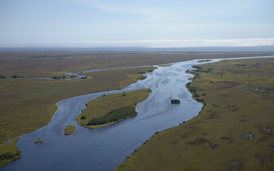 Низовья реки Кроноцкая